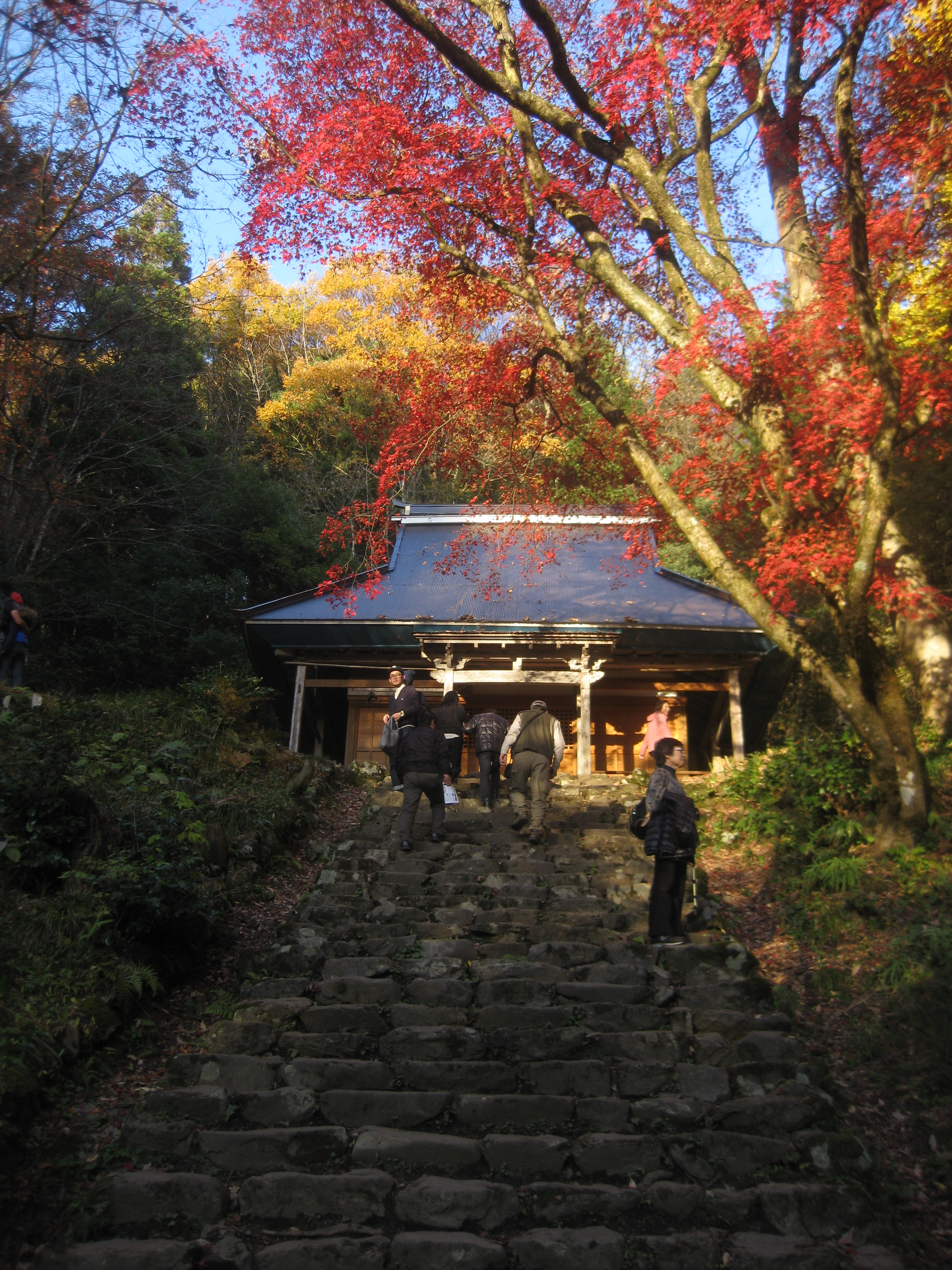 滋賀県長浜市木之本町の鶏足寺（旧飯福寺）。